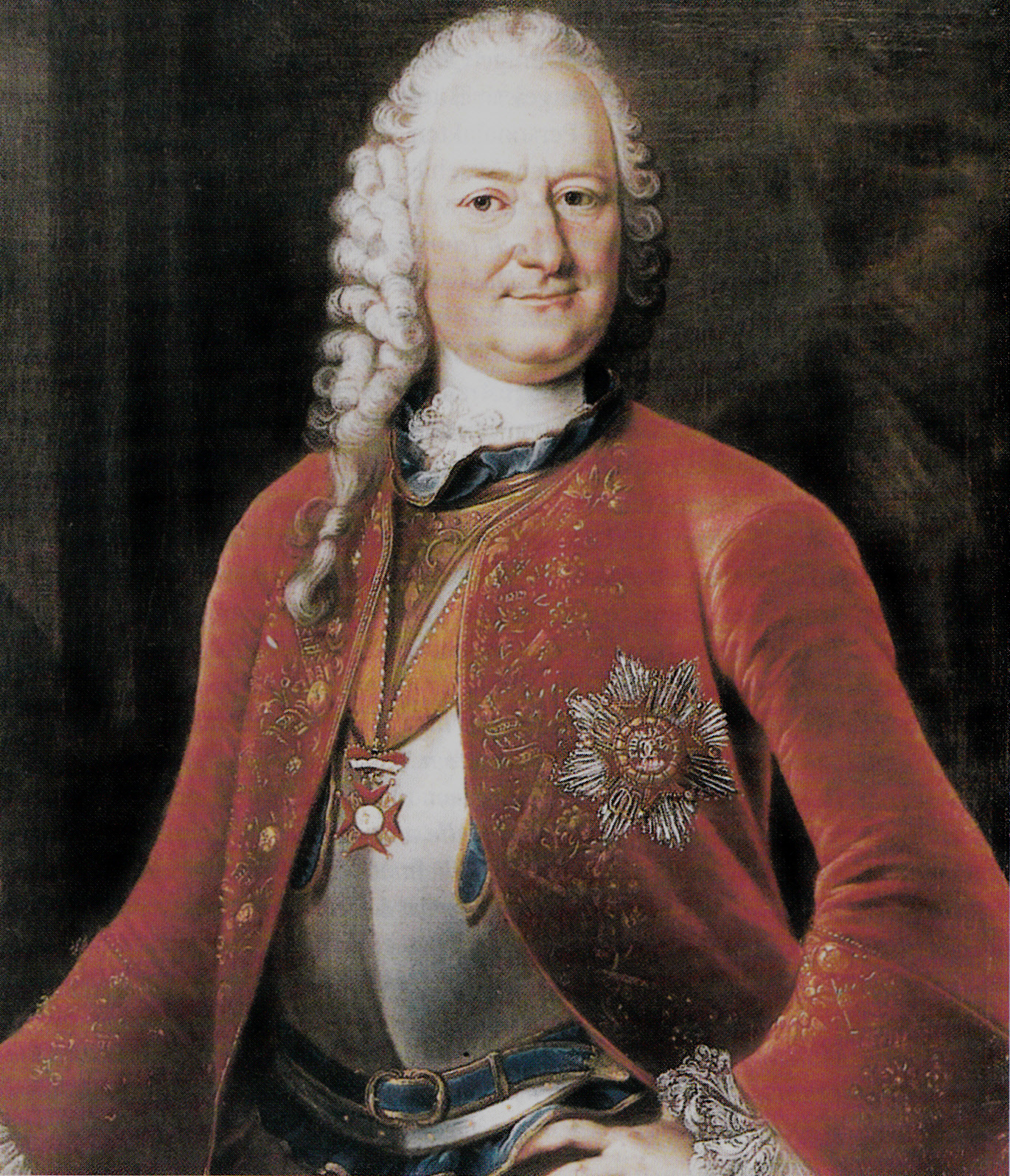 Ernst Friedrich Leutrum von Ertingen um 1751. Gemäss Quelle von Johann Ludwig Kisling (1746–1815), was aber aufgrund dessen Lebensdaten nicht möglich ist. Es muss von seinem Vater Philipp Heinrich Kisling stammen, der viele derartige Porträts gemalt hat